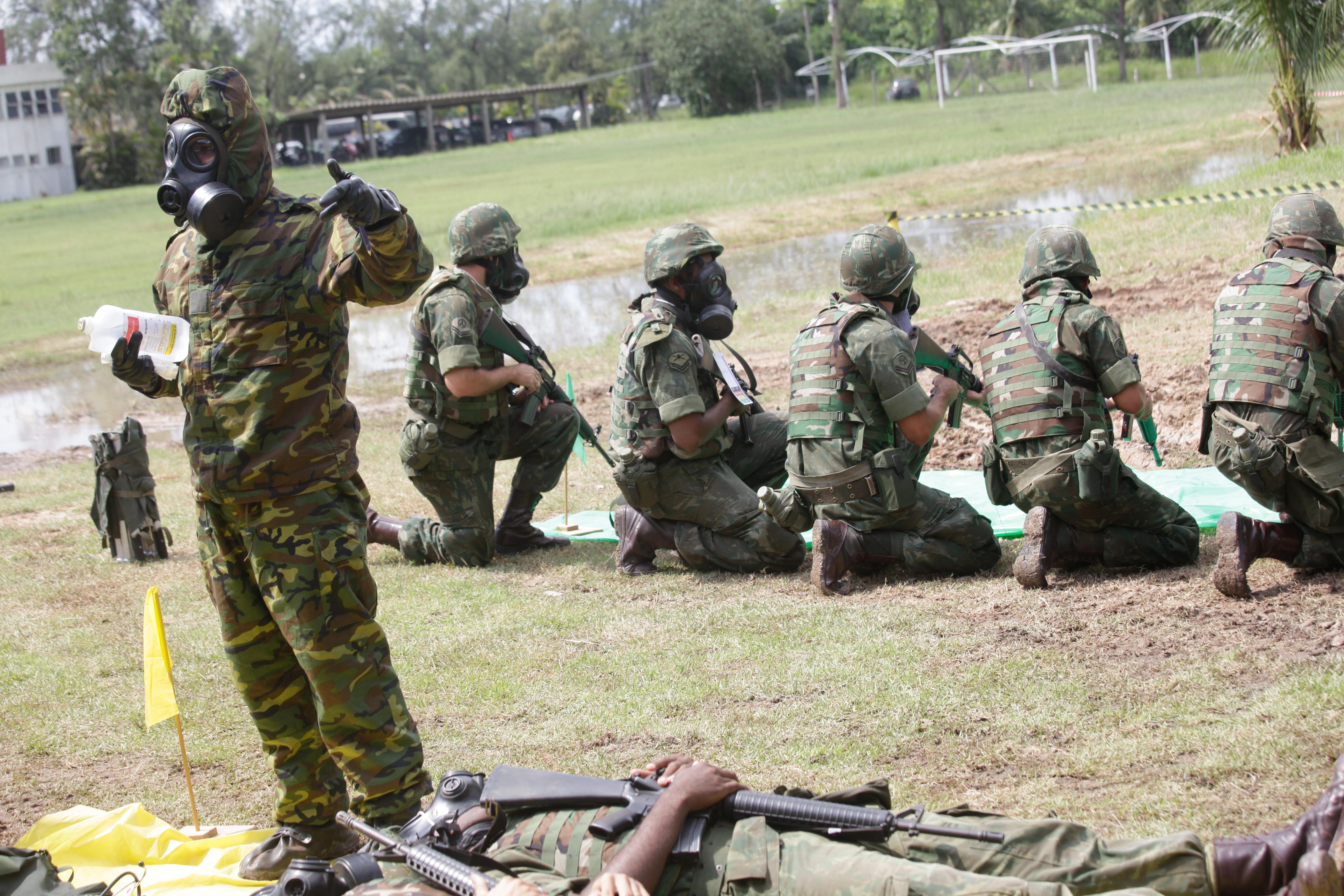 23 a 25/03/2015, Rio de Janeiro - RJ Fotos: Felipe Barra